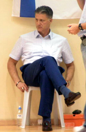 מיקי ברקוביץ' צופה במשחק אימון של רמת-השרון מול מכבי תל-אביב, תחילת עונת 2005/6